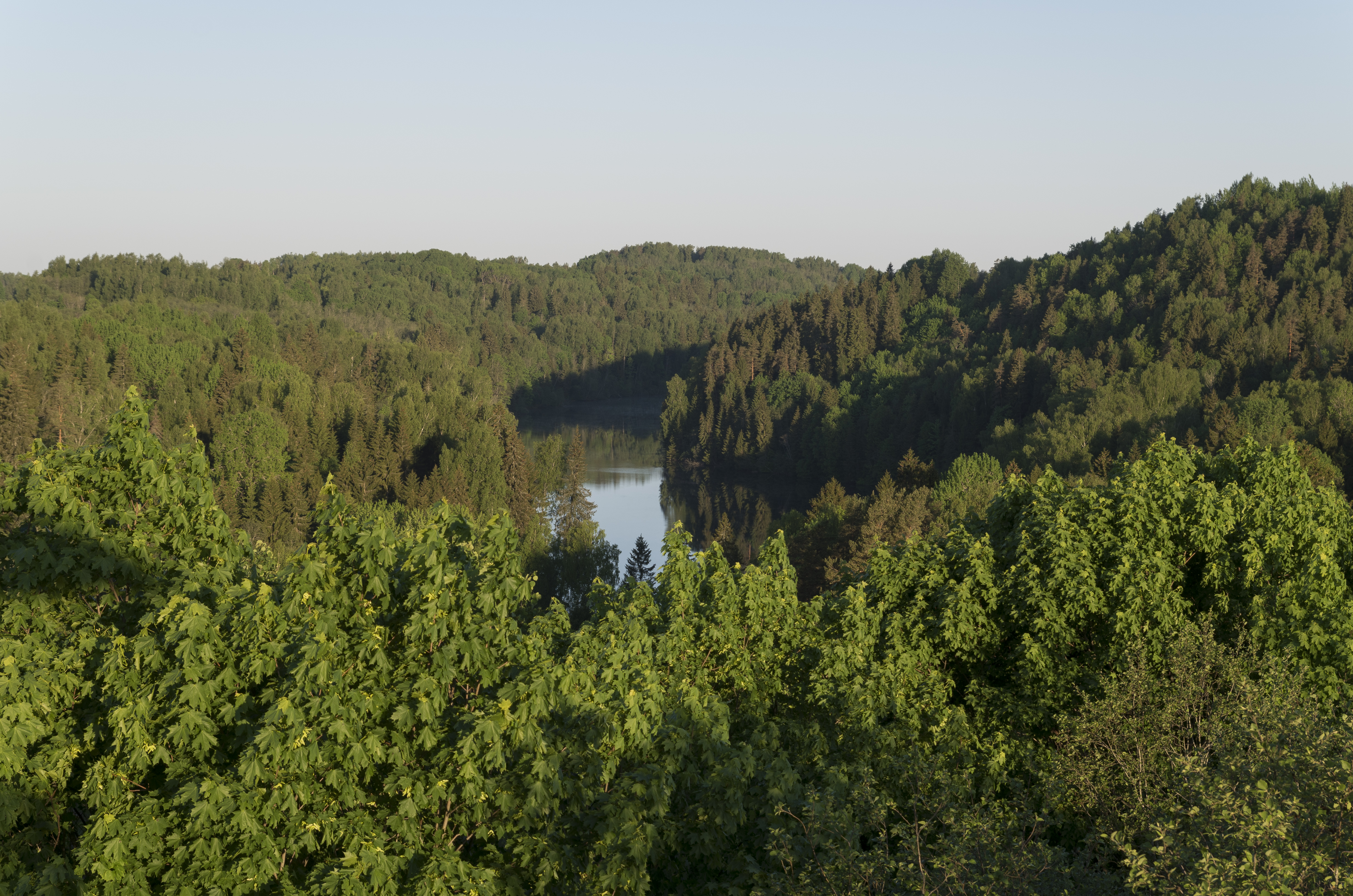 Korneti–Peļļi